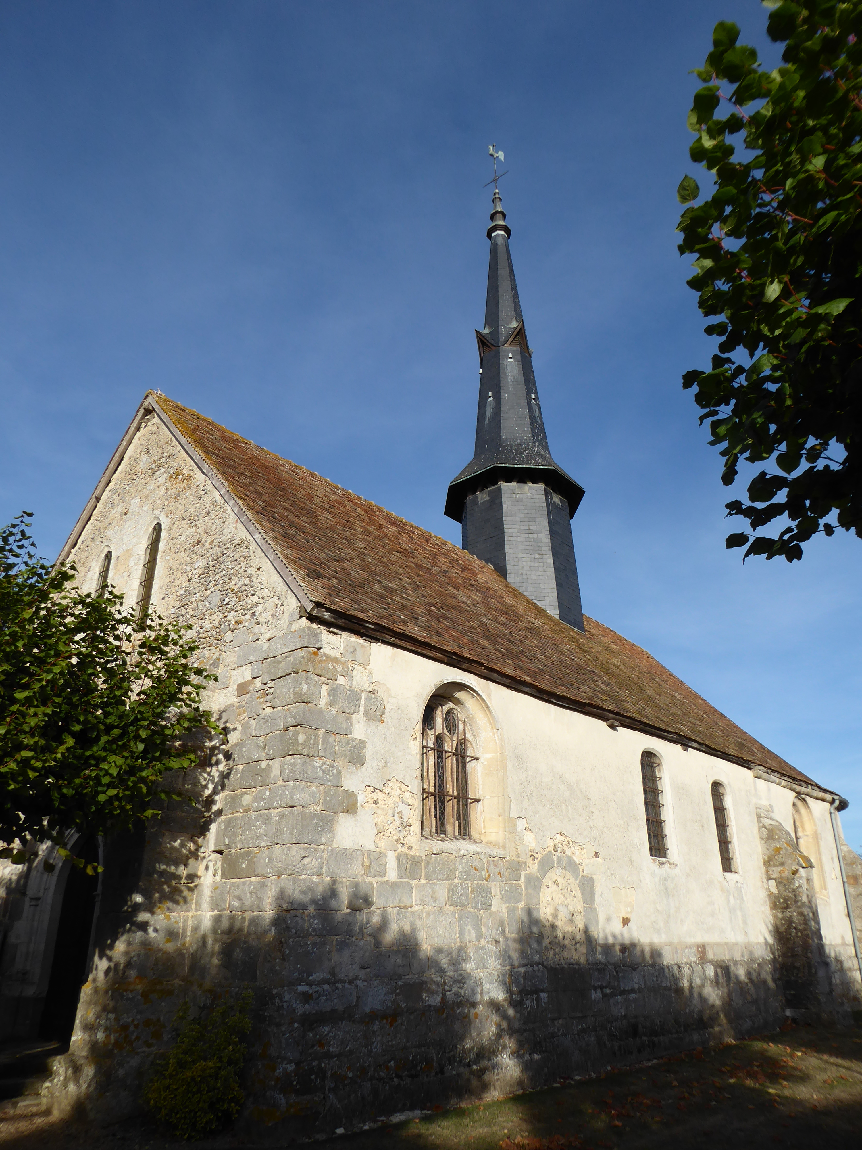 église Saint-Martin de la Chapelle-Forainvilliers, Eure-et-Loir, France.